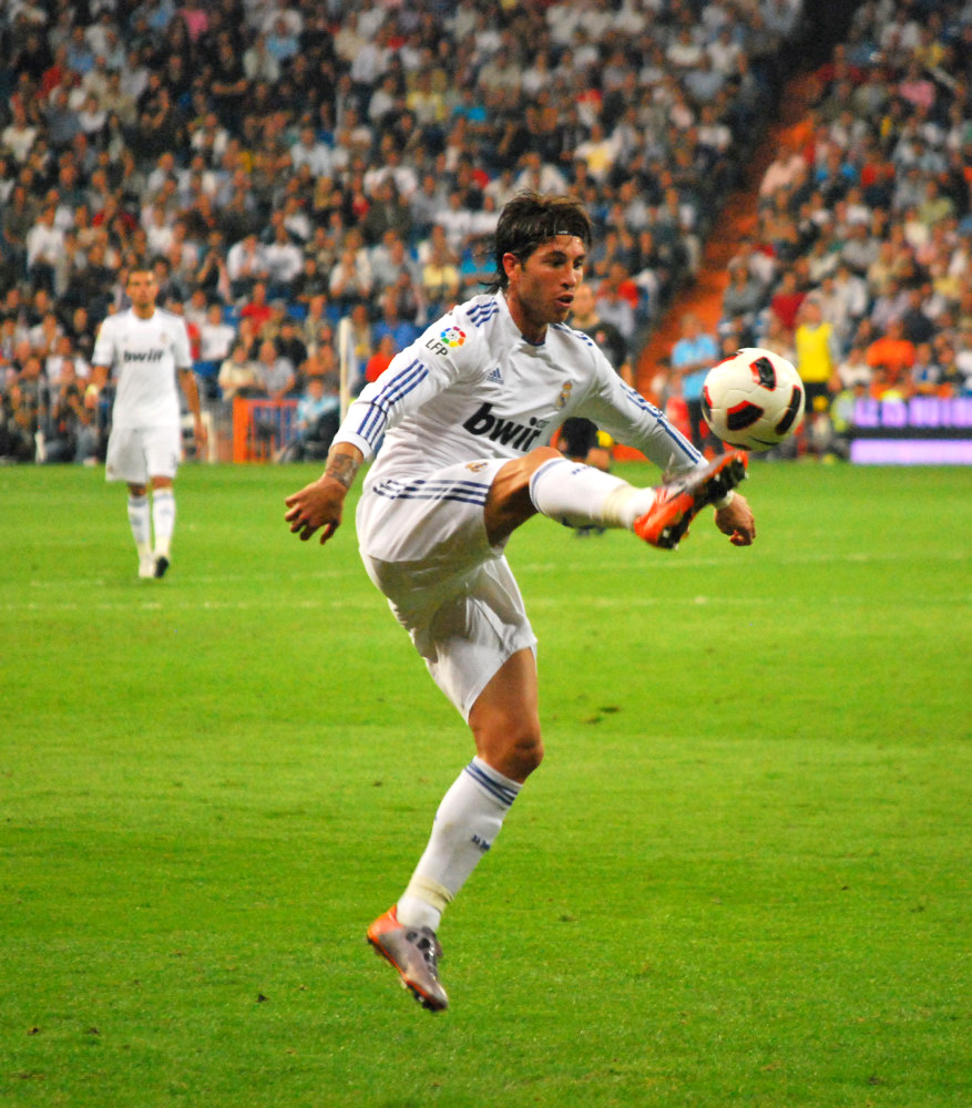 Control de Sergio Ramos, en un partido que enfrentó al Real Madrid y al Espanyol.